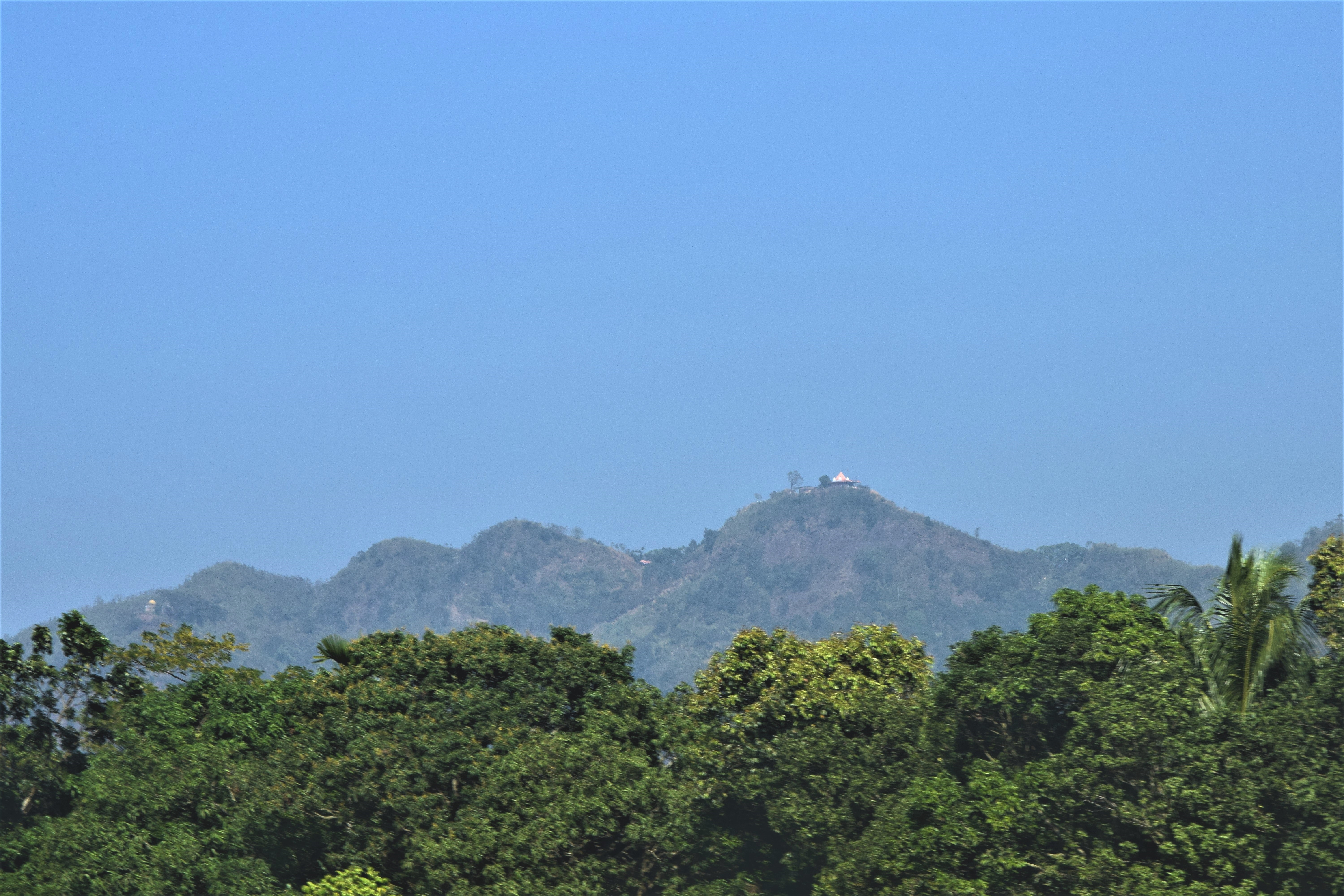 Chandranath Hill, also known as Sitakunda Hill, as seen from the Dhaka-Chittagong railroad. It is the tallest peak in Chittagong district, and is the location of Chandranath and Birupakkha temples.